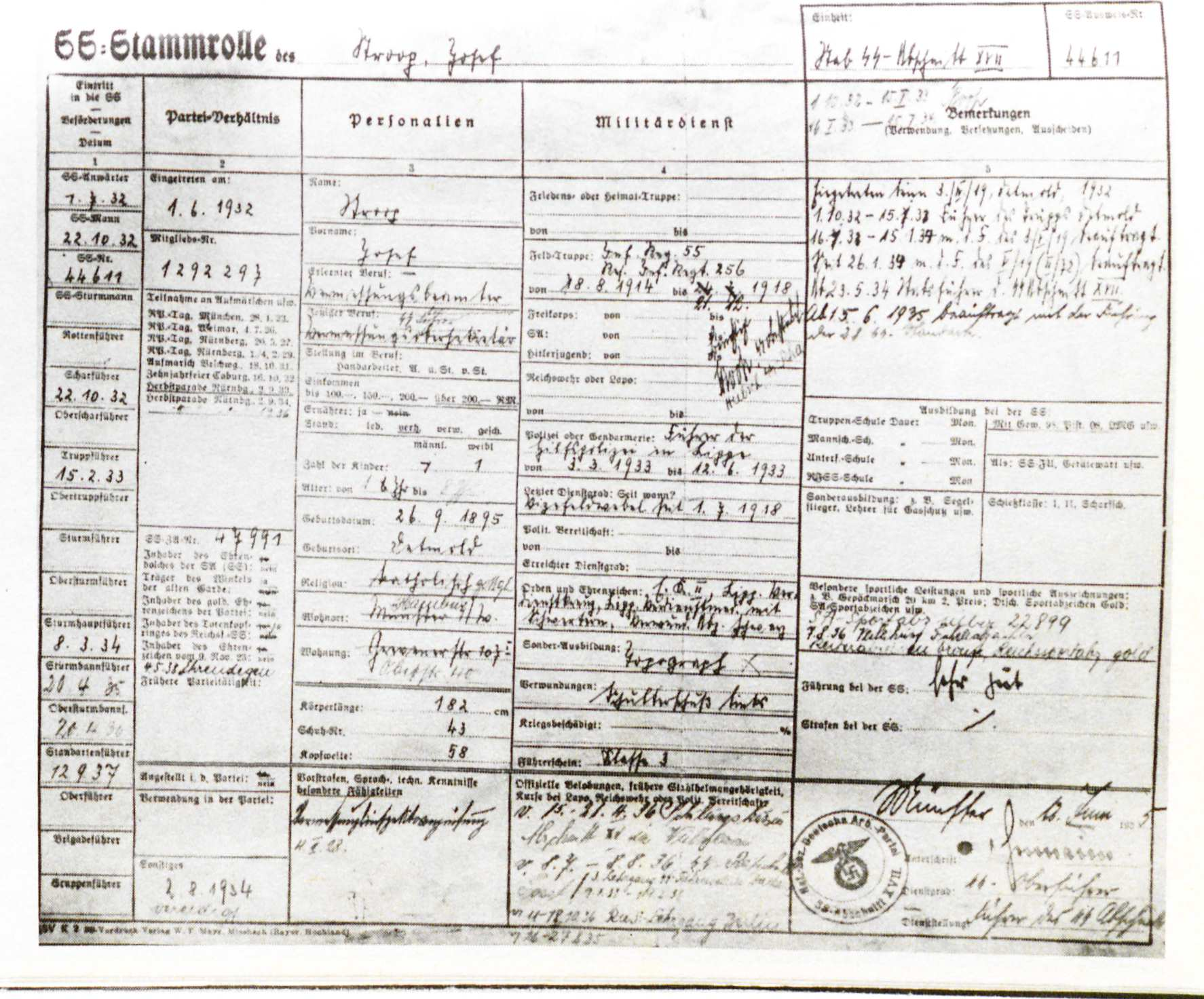 Josef Stroop SS-Stammrolle 1937